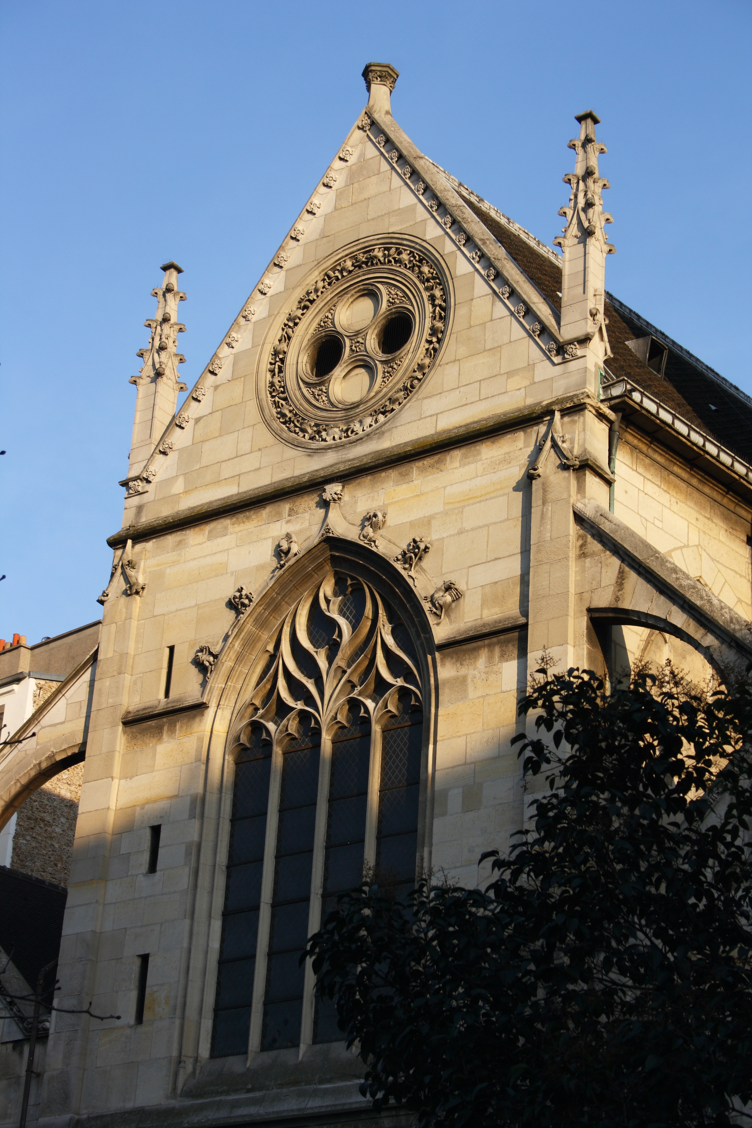 Katholische Pfarrkirche Saint-Nicolas-des-Champs im 3. Arrondissement von Paris, Rosette und Maßwerkfenster an der Westfassade